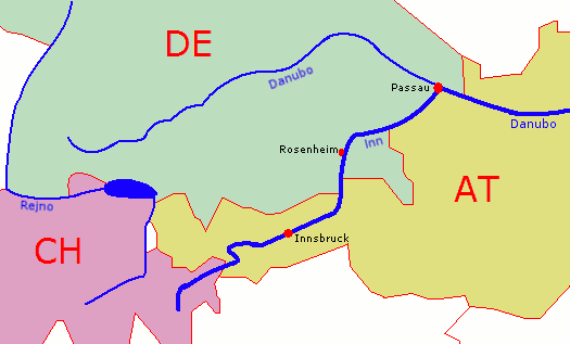 Skiza mapo de rivero Inn